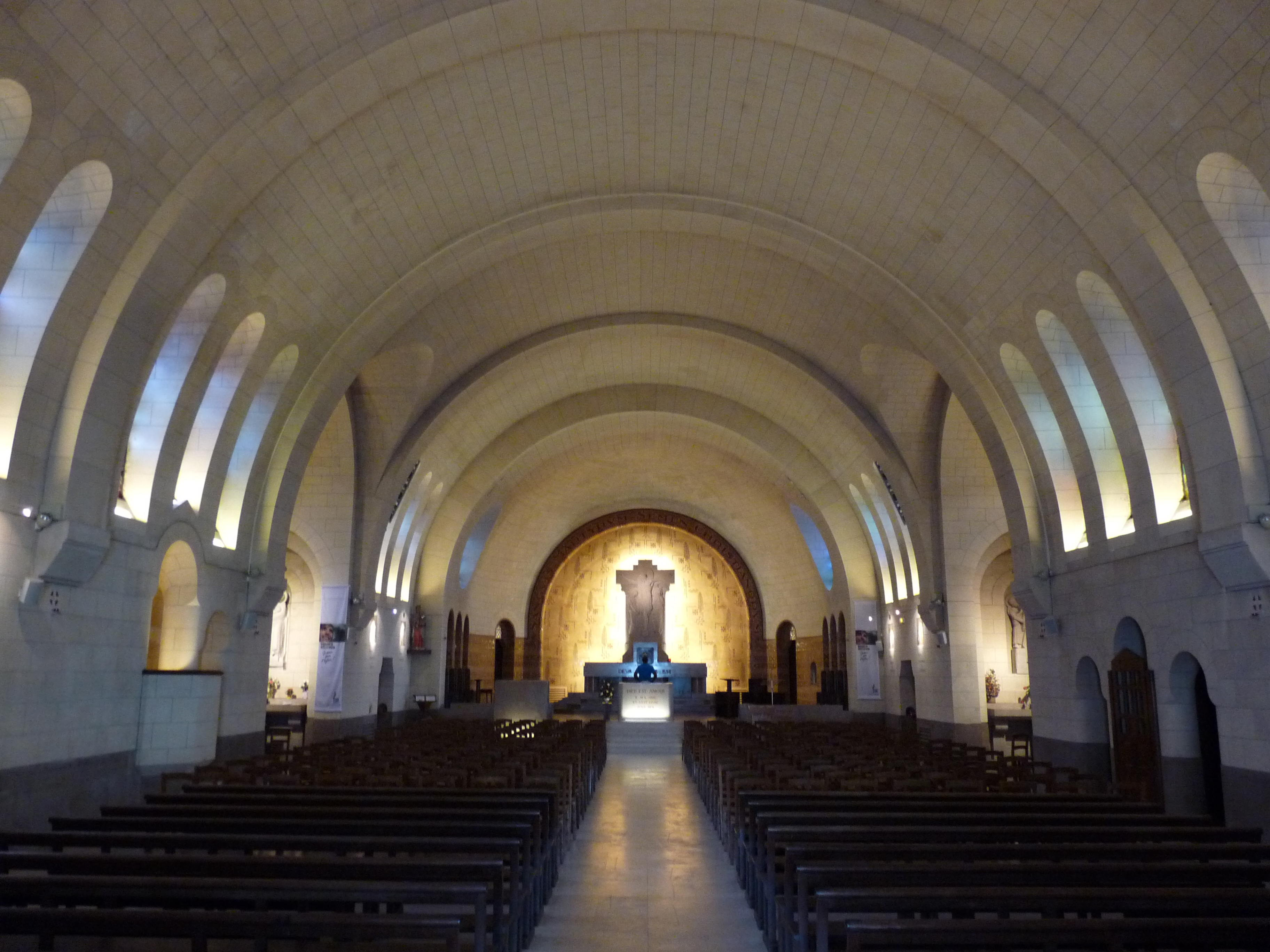 L'intérieur de l'église Notre Dame des Otages à Paris